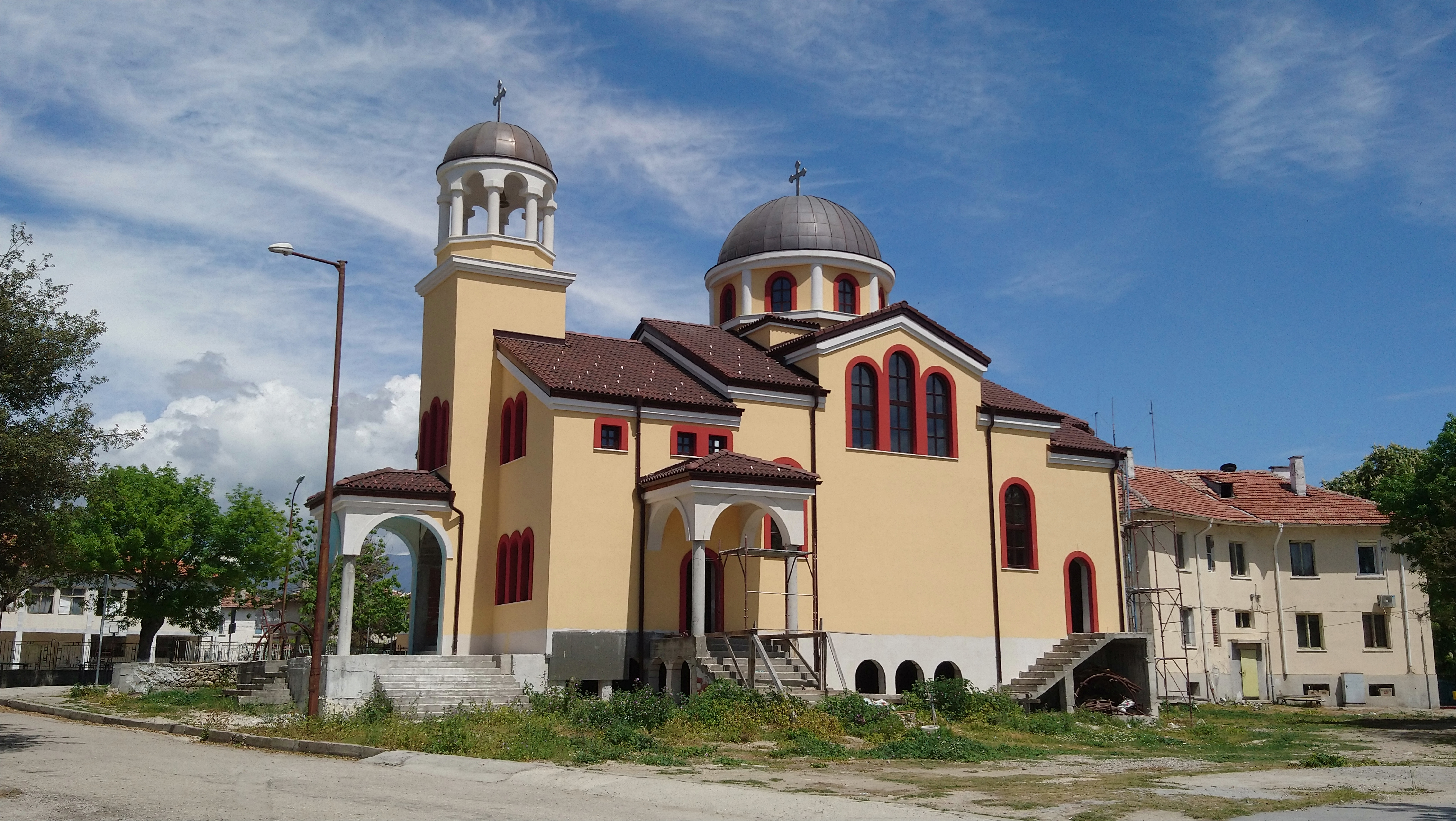 Църквата Света Богородица в центъра на село Карунци